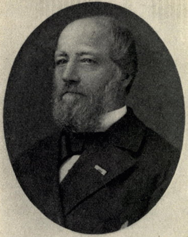 mr. C. Cardinaal (1819-1893), van 1866 tot 1892 hoofdcommissaris van politie te Rotterdam.